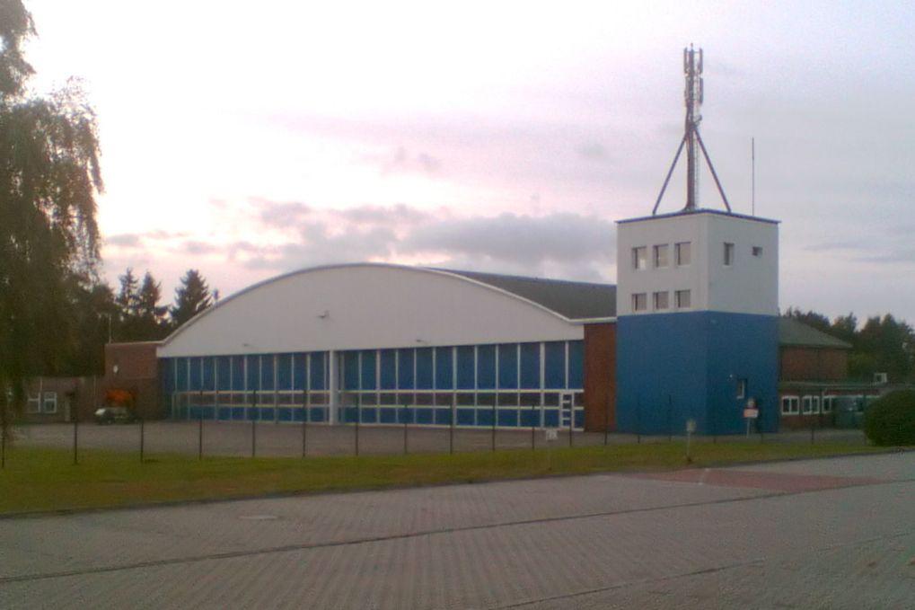 Flugzeughalle auf dem Flugplatz Kiel-Holtenau